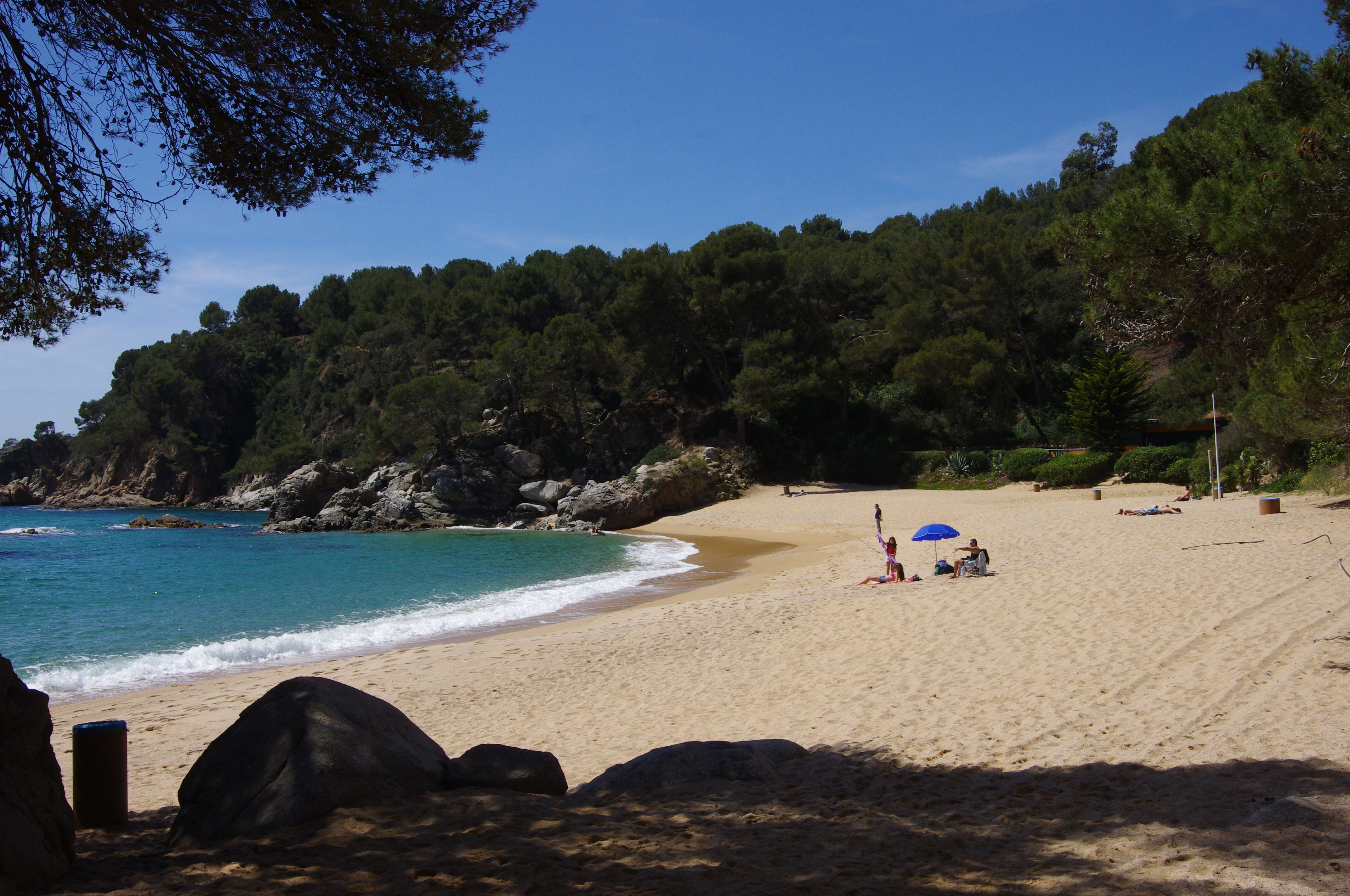 Platja de Treumal (Lloret de Mar)